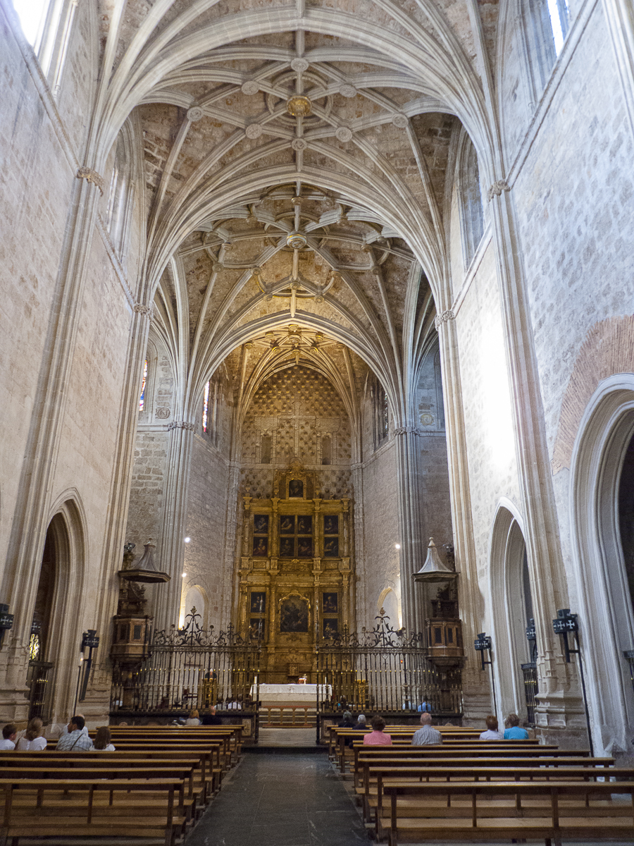 08082013 193451 LEÓN 0432